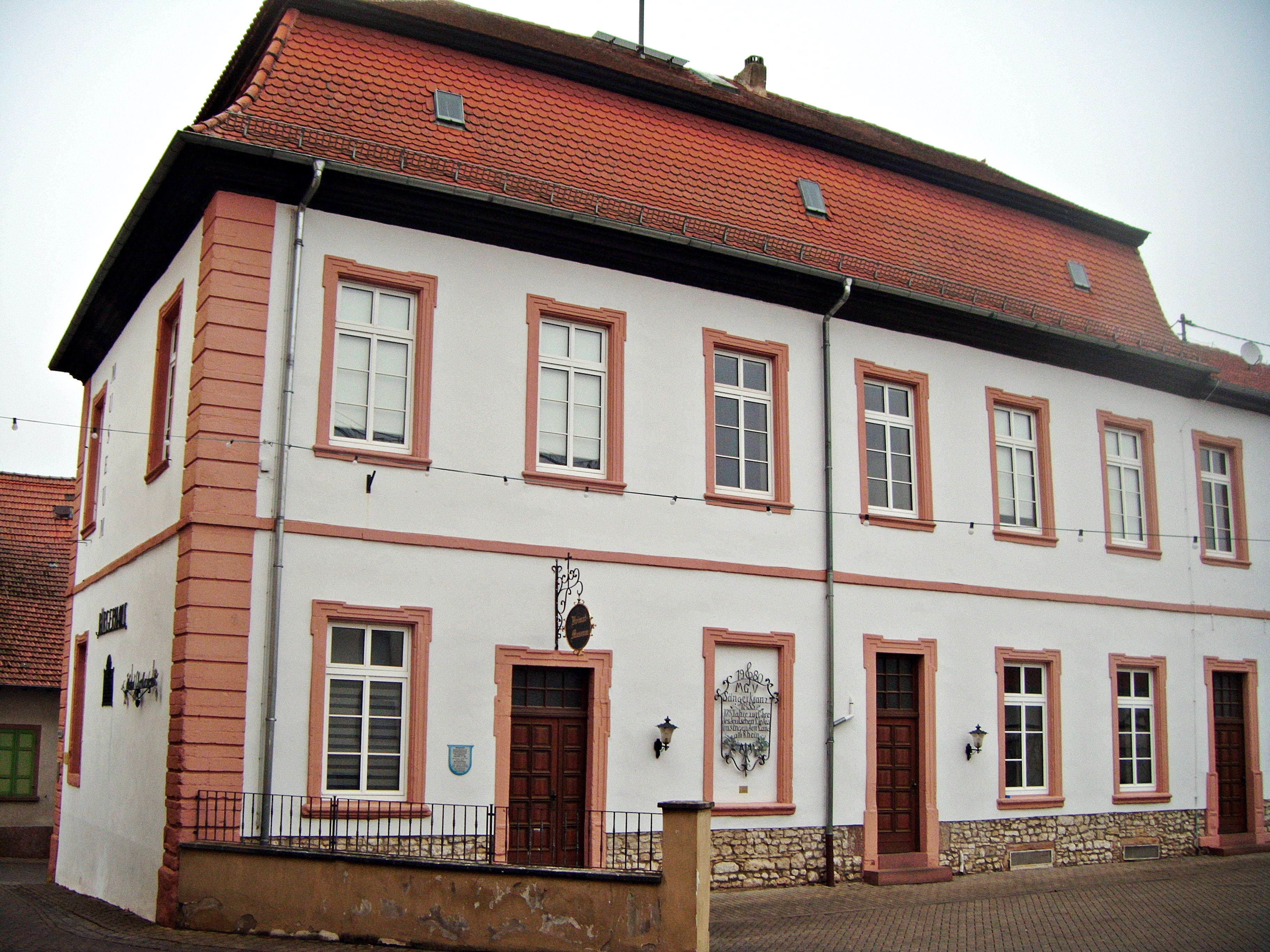 Oberflörsheim Deutschordens-Komturei